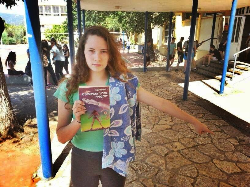 יום המגבת בספריה הצעירה של טבעון: מדריך הטרמפיסט לגלקסיה